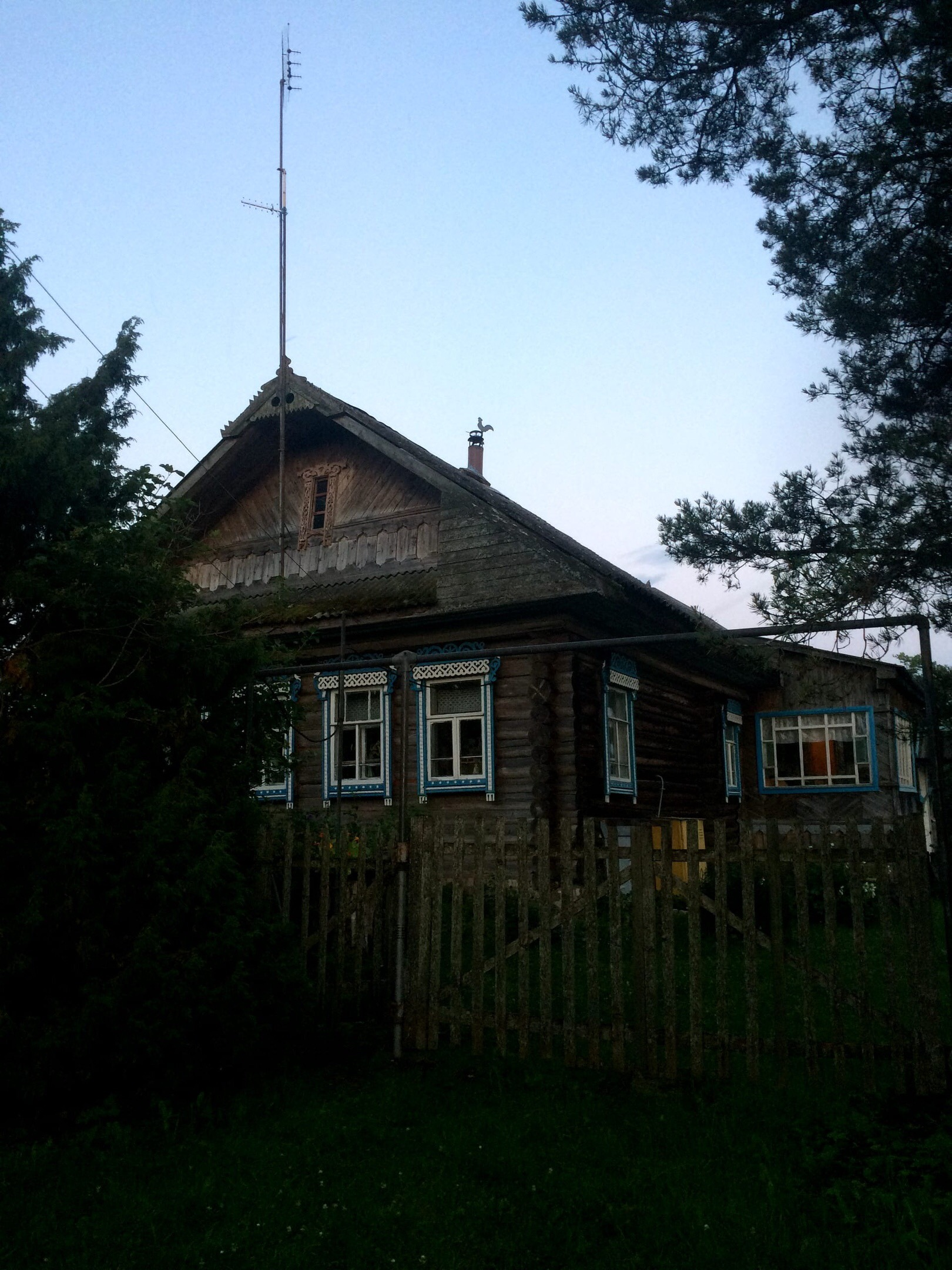 Дом в деревне Речица Тверской области